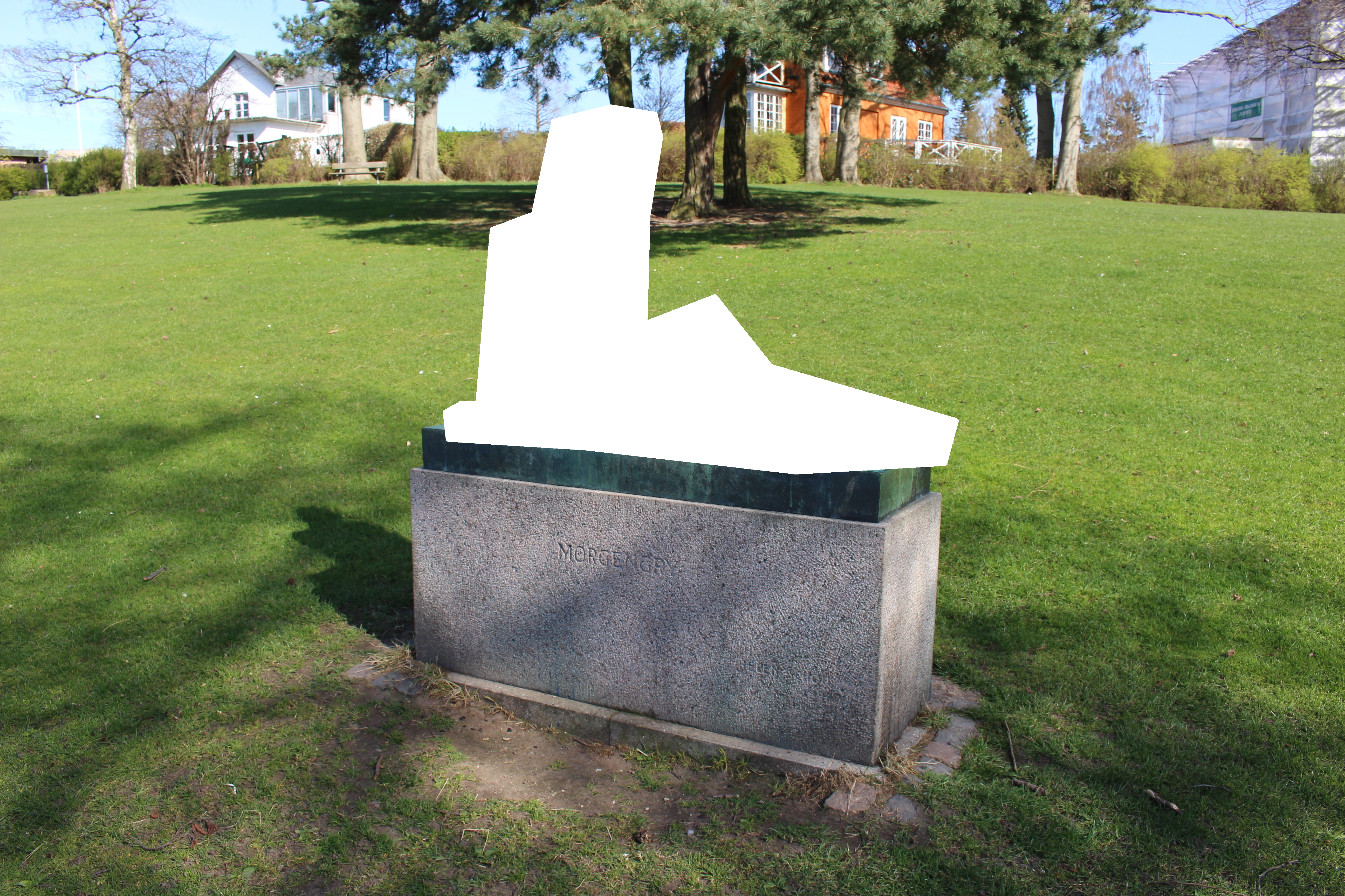 Foto af placeringen af Helen Schous skulptur 'Morgengry' i Folkeparken, Kongens Lyngby, Danmark